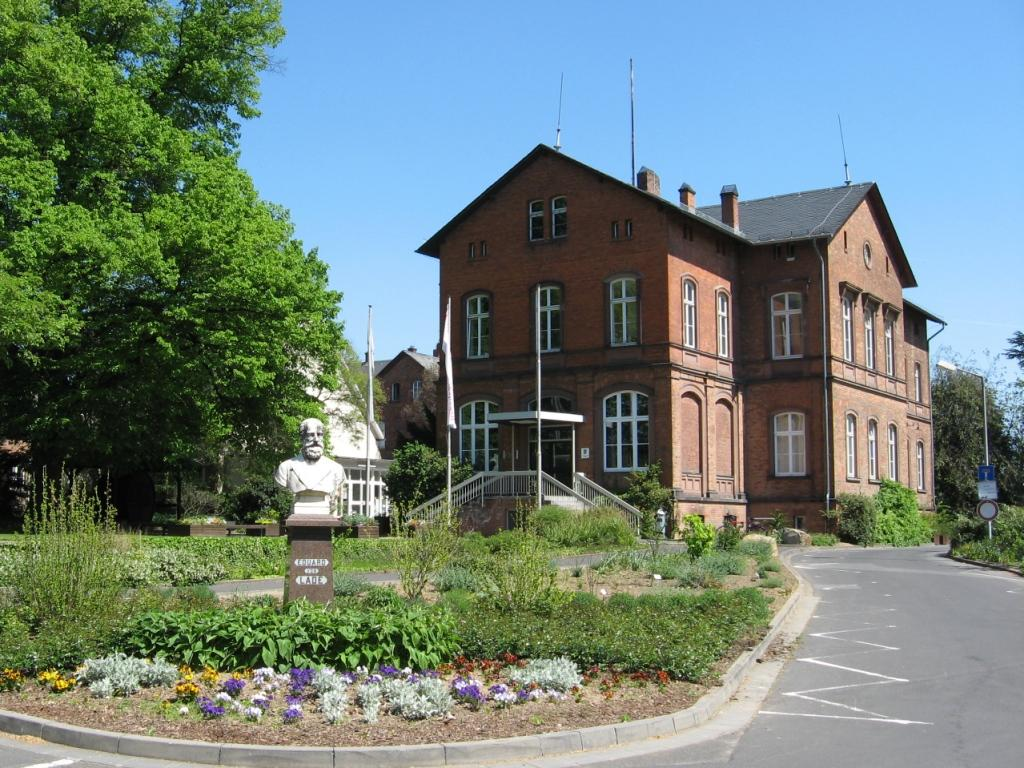 Verwaltungsgebäude der FA Geisenheim und des FB Geisenheim